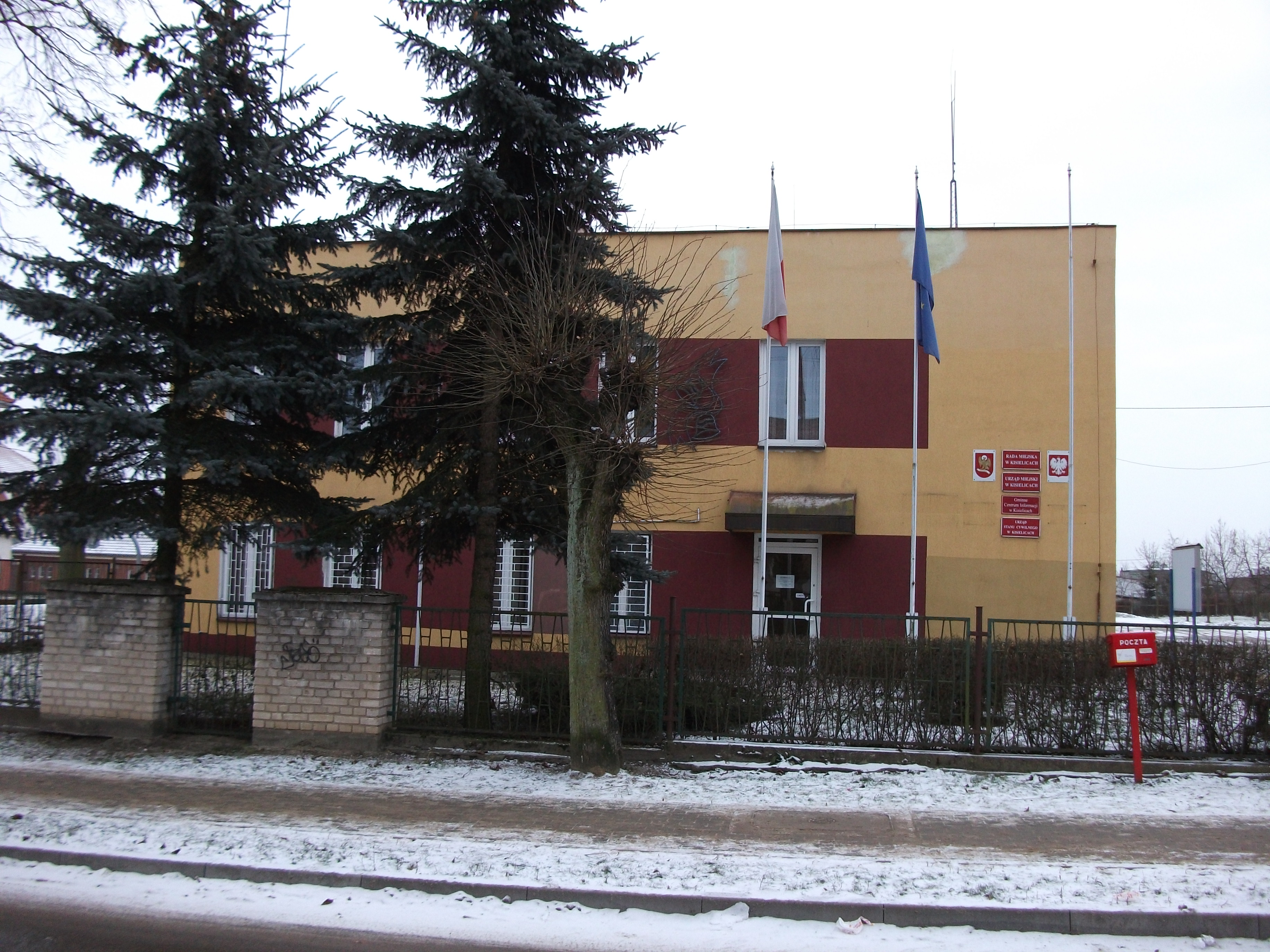 Urząd Miasta i Gminy w Kisielicach